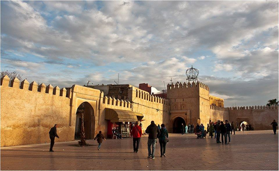 ساحة باب المقام بصفرو